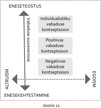 Liberalismi kontseptuaalsed koolkonnad paigutatuna vabaduse teljele.